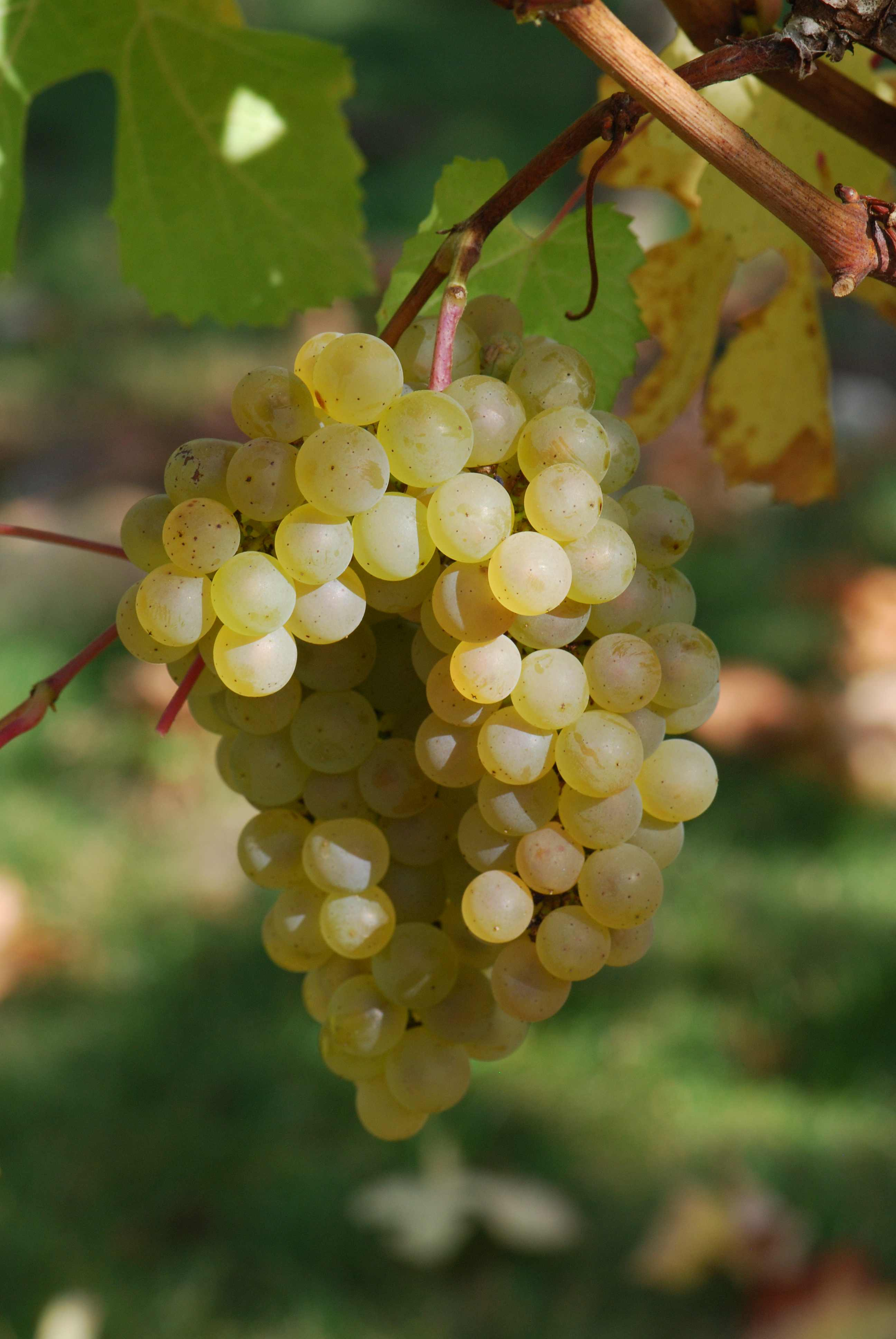 Vitis vinifera, chardonnay, conservatoire du vignoble charentais, Cherves 17